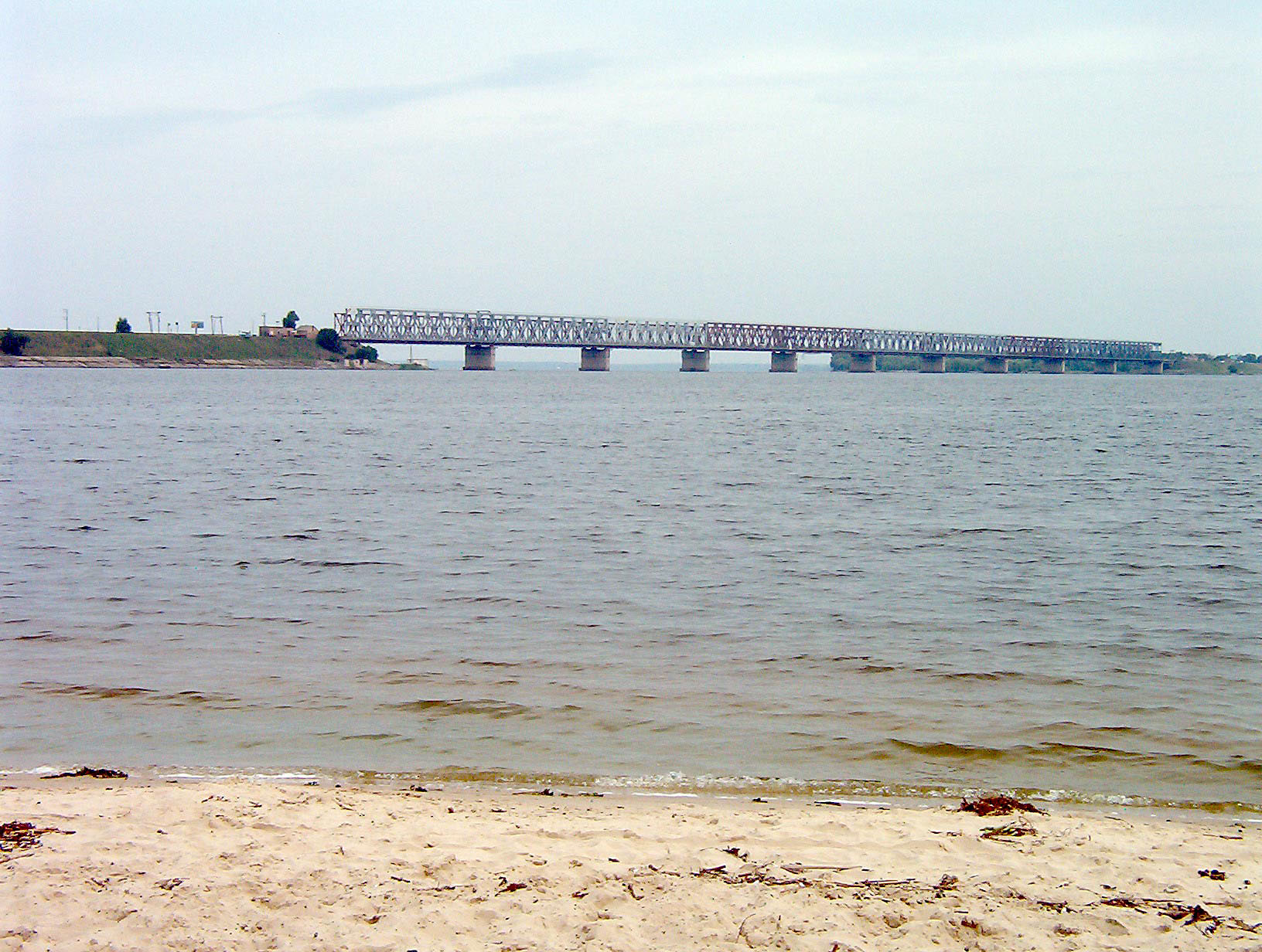 Blick vom Ufer des Dnjepr auf die Eisenbahn- und Autobrücke bei Tscherkassy